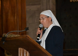 Sr Marie Pierre-Simon témoignage de sa guérison en l'abbatiale Saint Trophime d'Arles